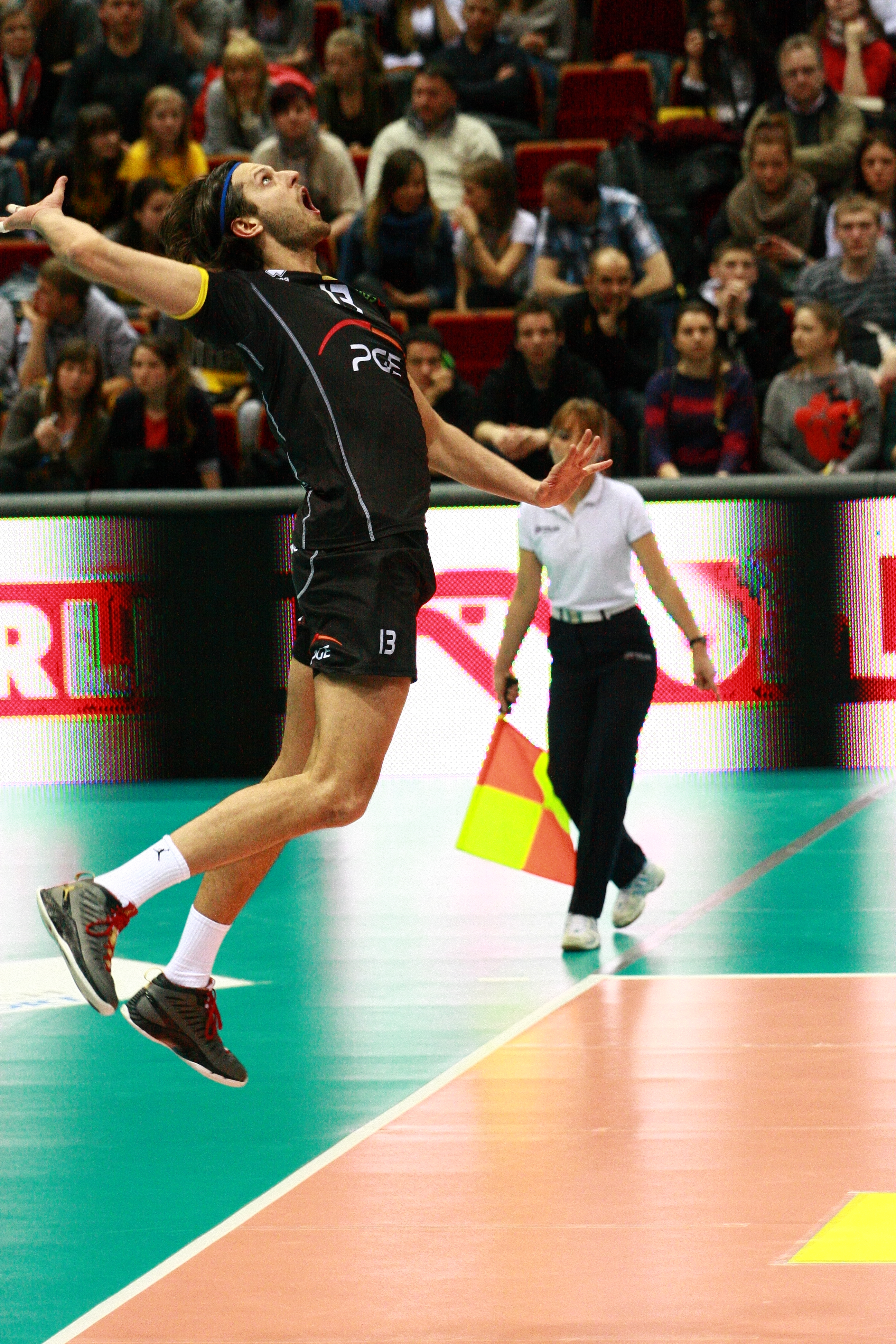 Lotos Trefl Gdańsk vs Skra Bełchatów